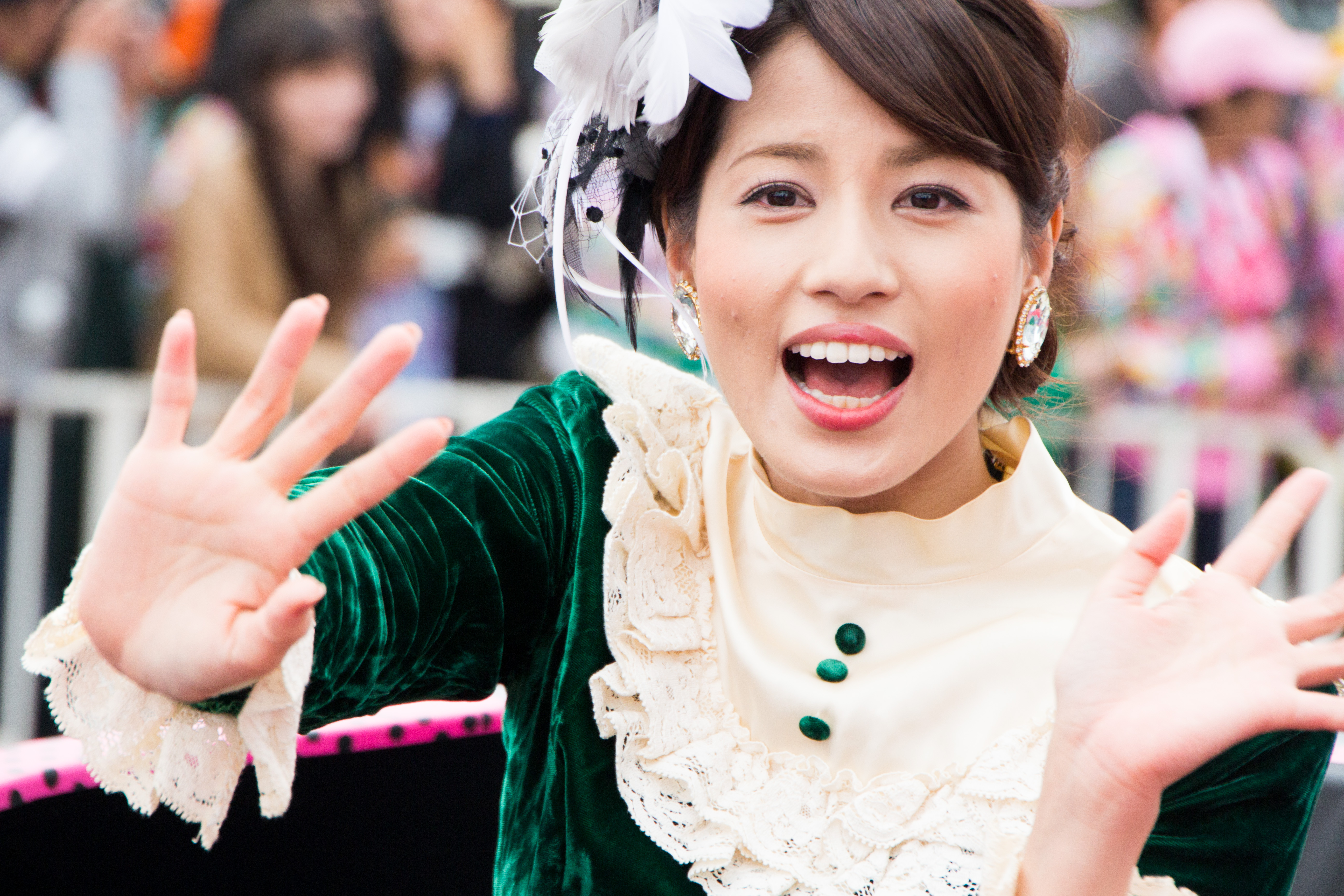 T-SPOOK 2016 永島優美